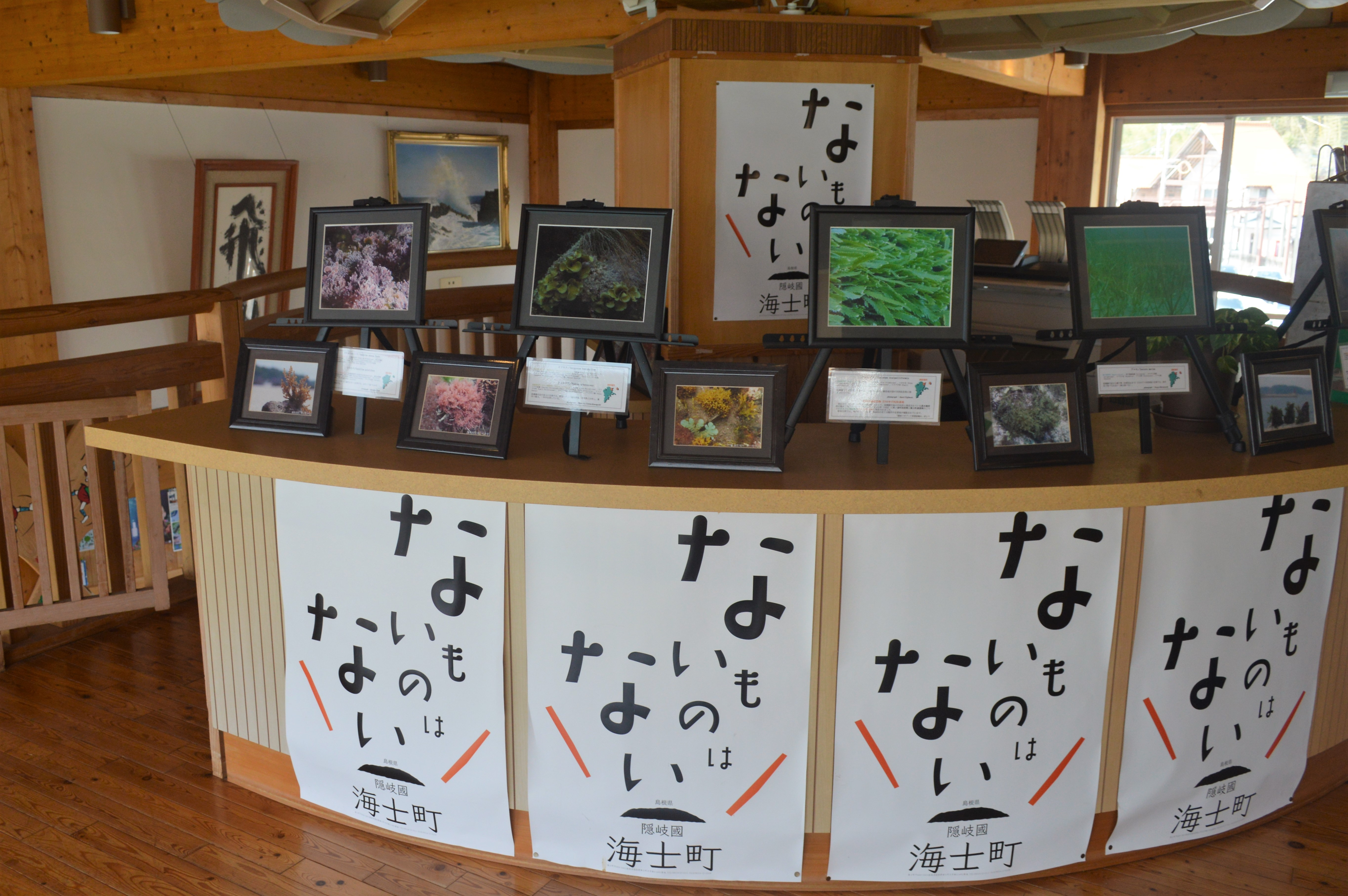 島根県隠岐郡海士町にある承久海道キンニャモニャセンター。海士町のキャッチコピーである「ないものはない」のポスター。